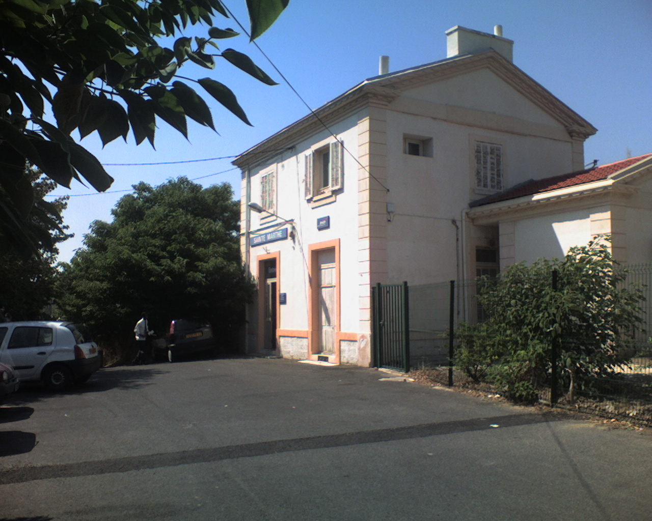 le BV et la cour voyageur de Sainte-Marthe-en-Provence.